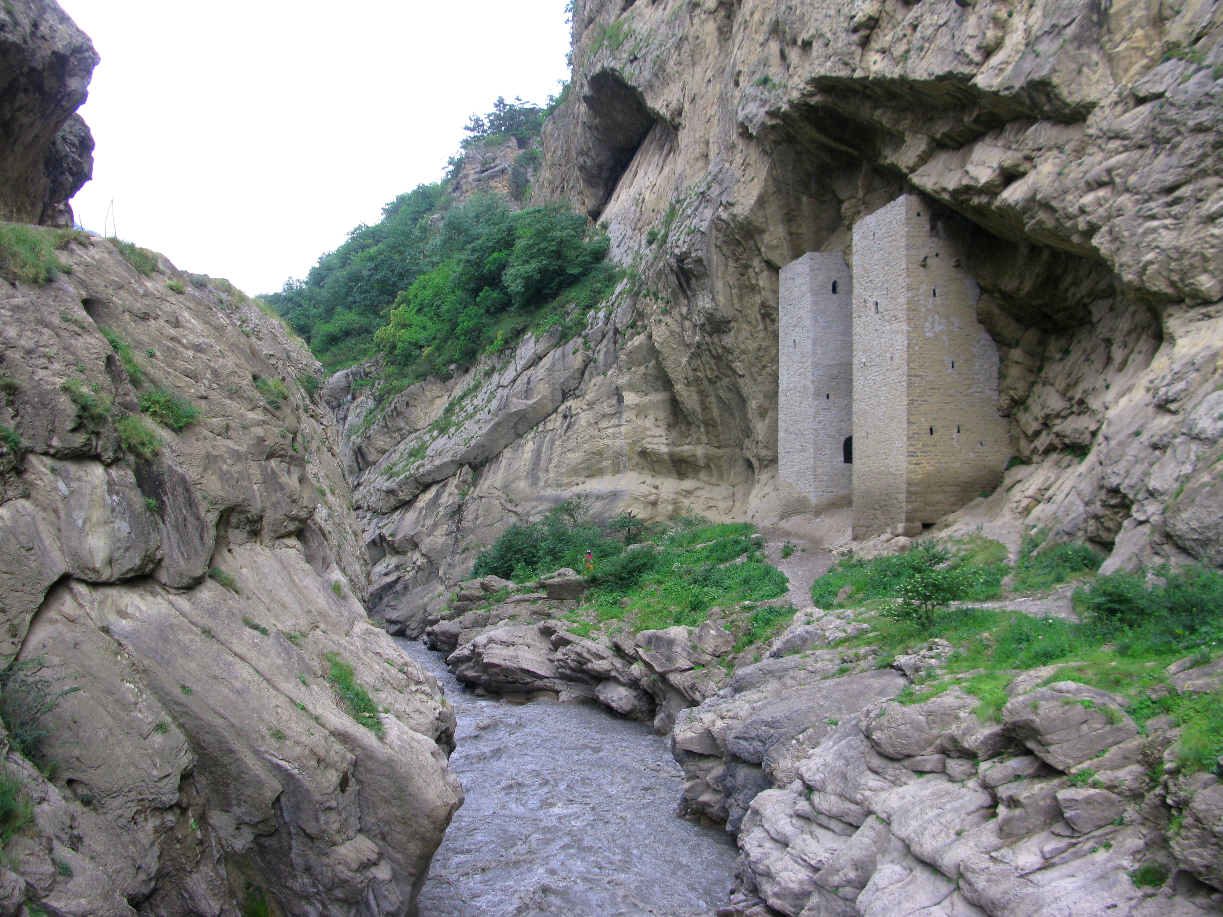 Боевые башни (Чеченская Республика, Урус-Мартан, село ушкалой)